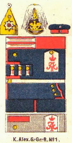 Schematische Farbdarstellung der Uniform des Kaiser Alexander Garde-Grenadier-Regiments Nr. 1